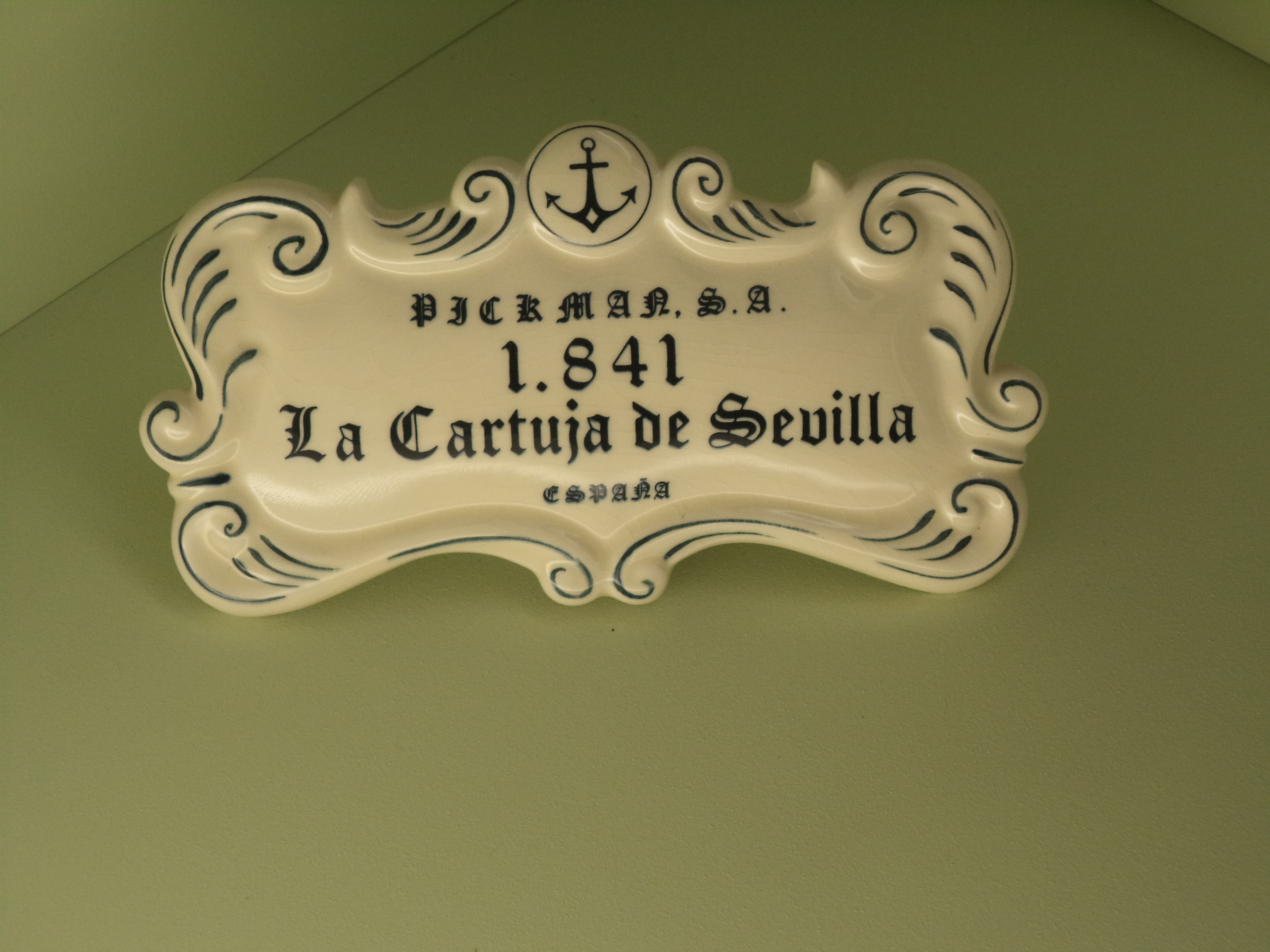 Placa de cerámica con el logo de La Cartuja de Sevilla. Museo de Artes y Costumbres de Sevilla.